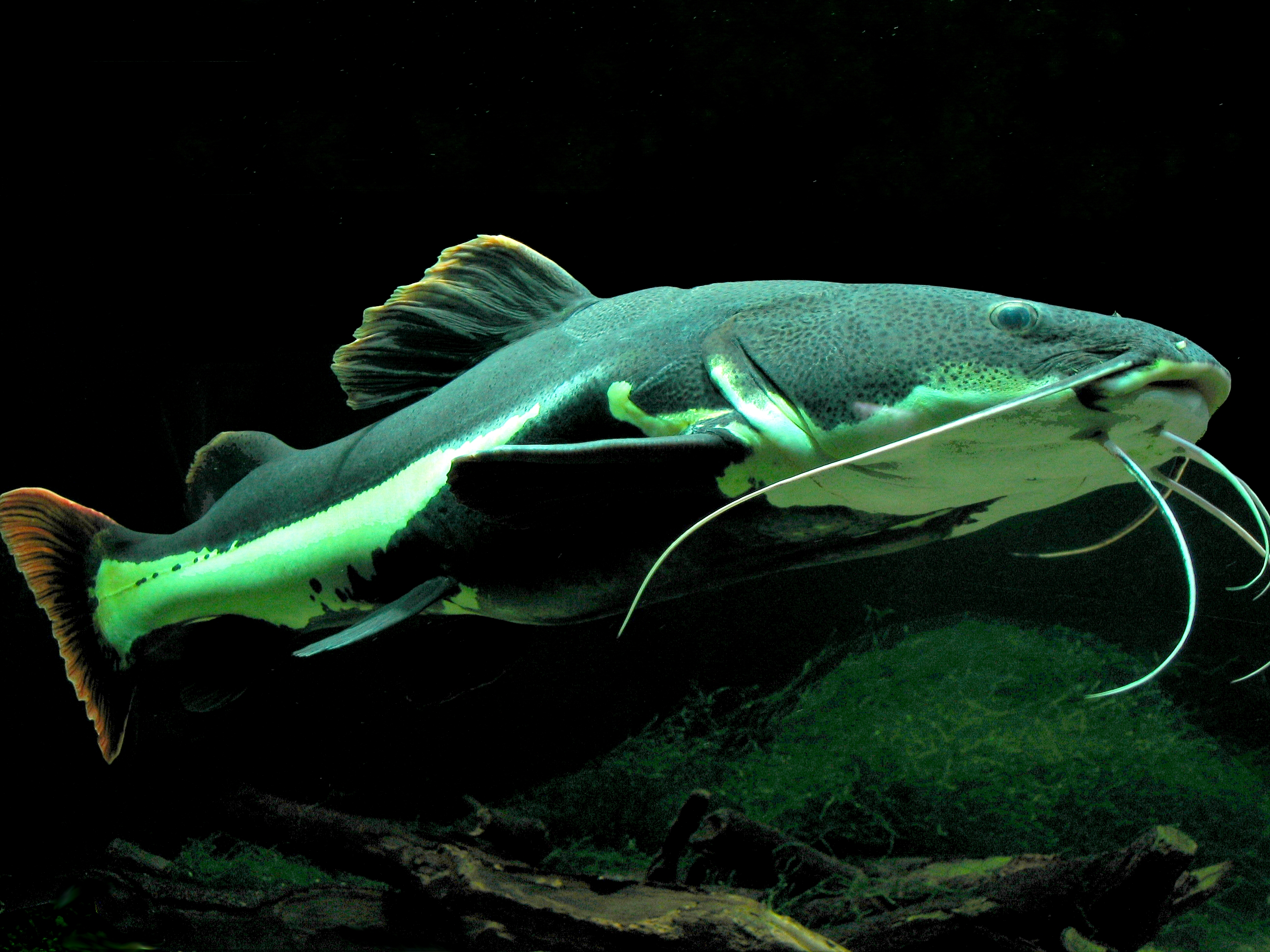 Phractocephalus hemioliopterus; adult; size c. 50-60 cm, aquarium